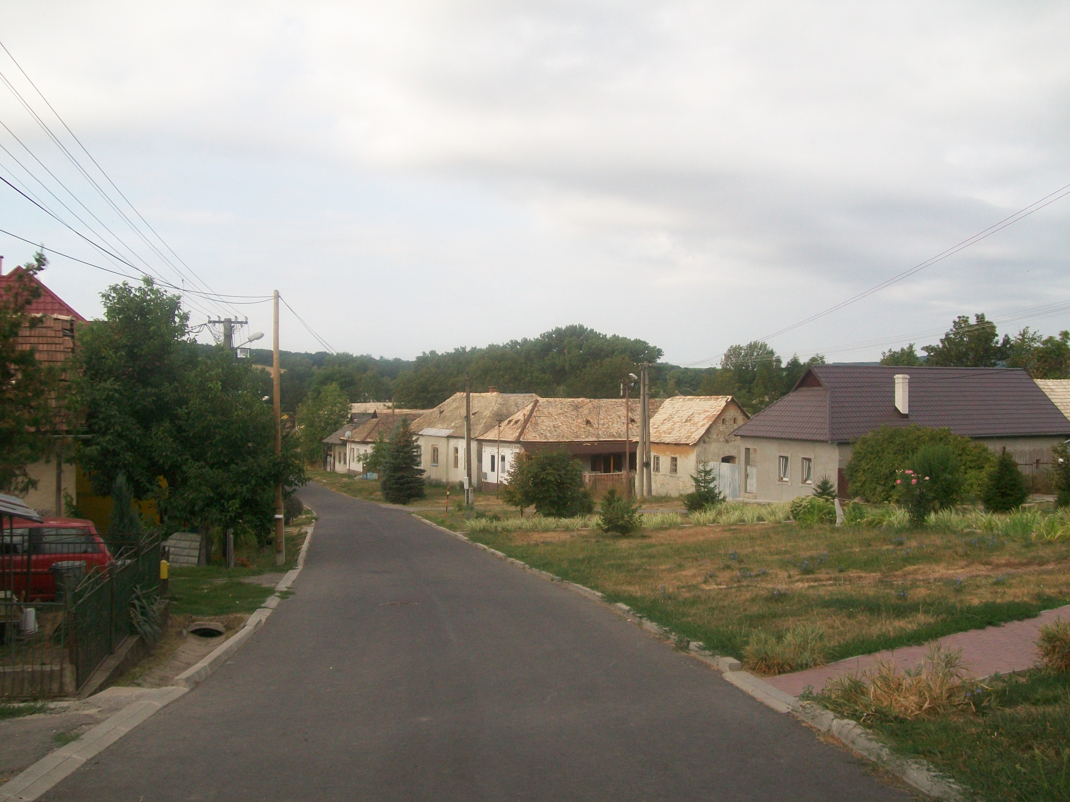 Ulica obce Pôtor